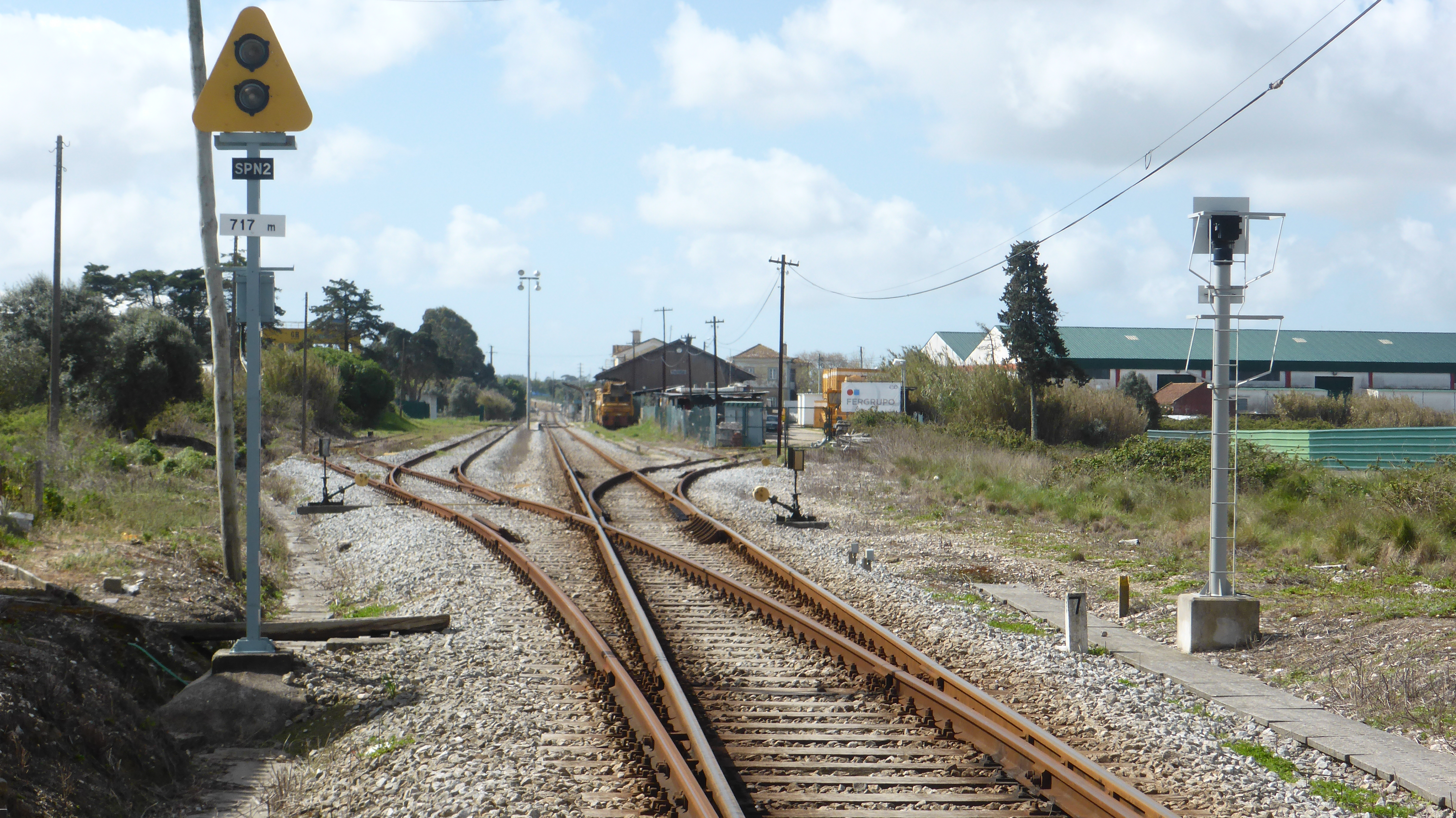 Serra de Olelas